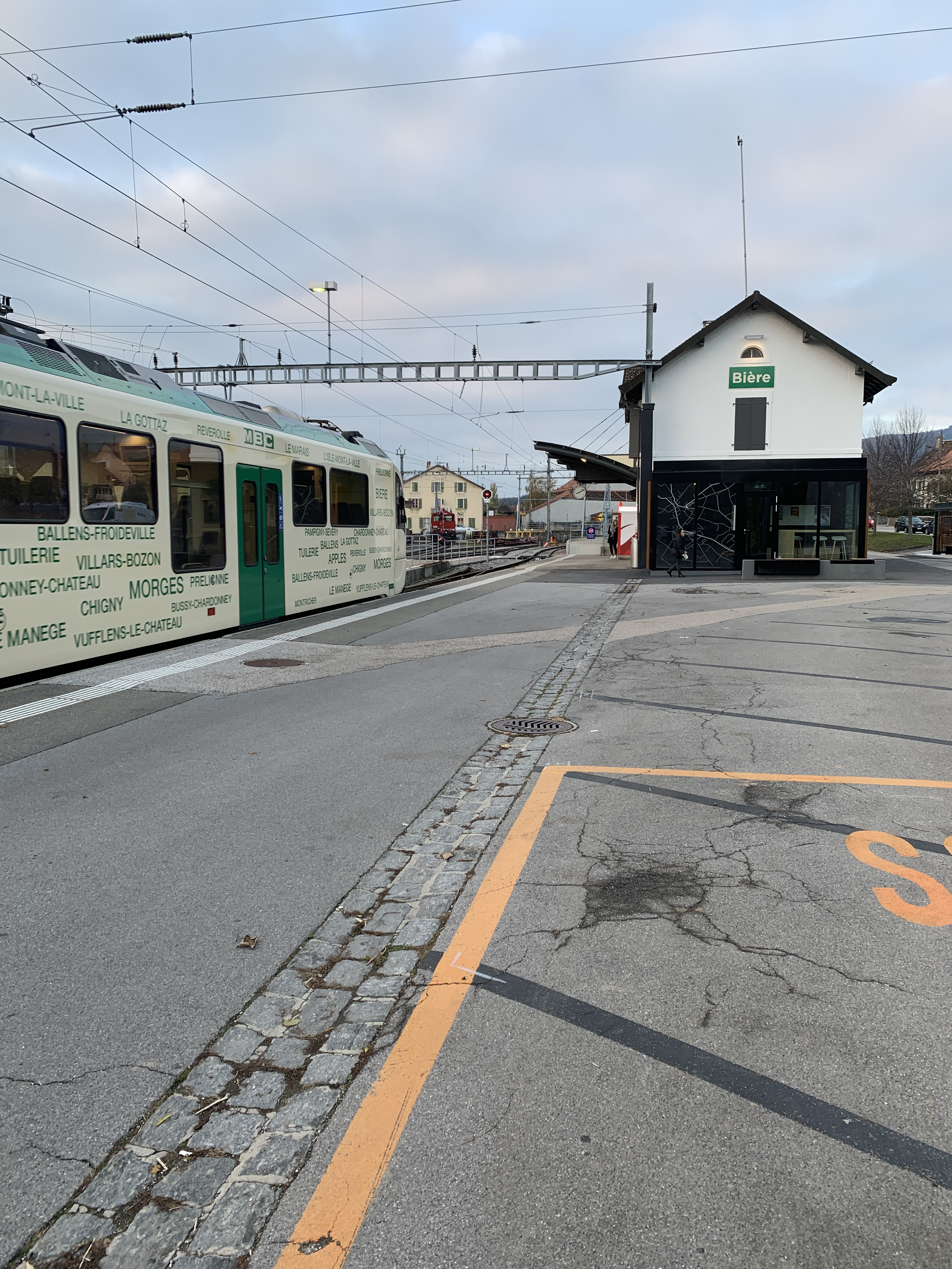 Gare de Bière après la rénovation 2018